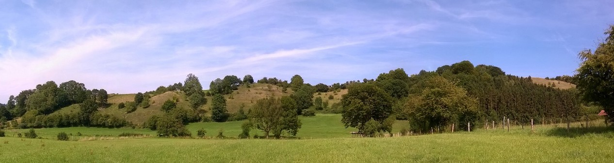 La réserve du Thier du Gibet (4 ha) à Theux, bien connu localement pour sa célèbre croix, occupe une position centrale dans la « Fenêtre de Theux » constituée d’affleurements calcaires au sein du paysage ardennais. Identifié comme précieux depuis des décennies, cet ilot calcaire abrite une végétation de grand intérêt. L’embroussaillement avancé a nécessité, depuis 2010, dans le cadre du projet LIFE « Hélianthème », des travaux de réouverture importants (pâturage de moutons, fauchage, ramassage) régulièrement réalisés.